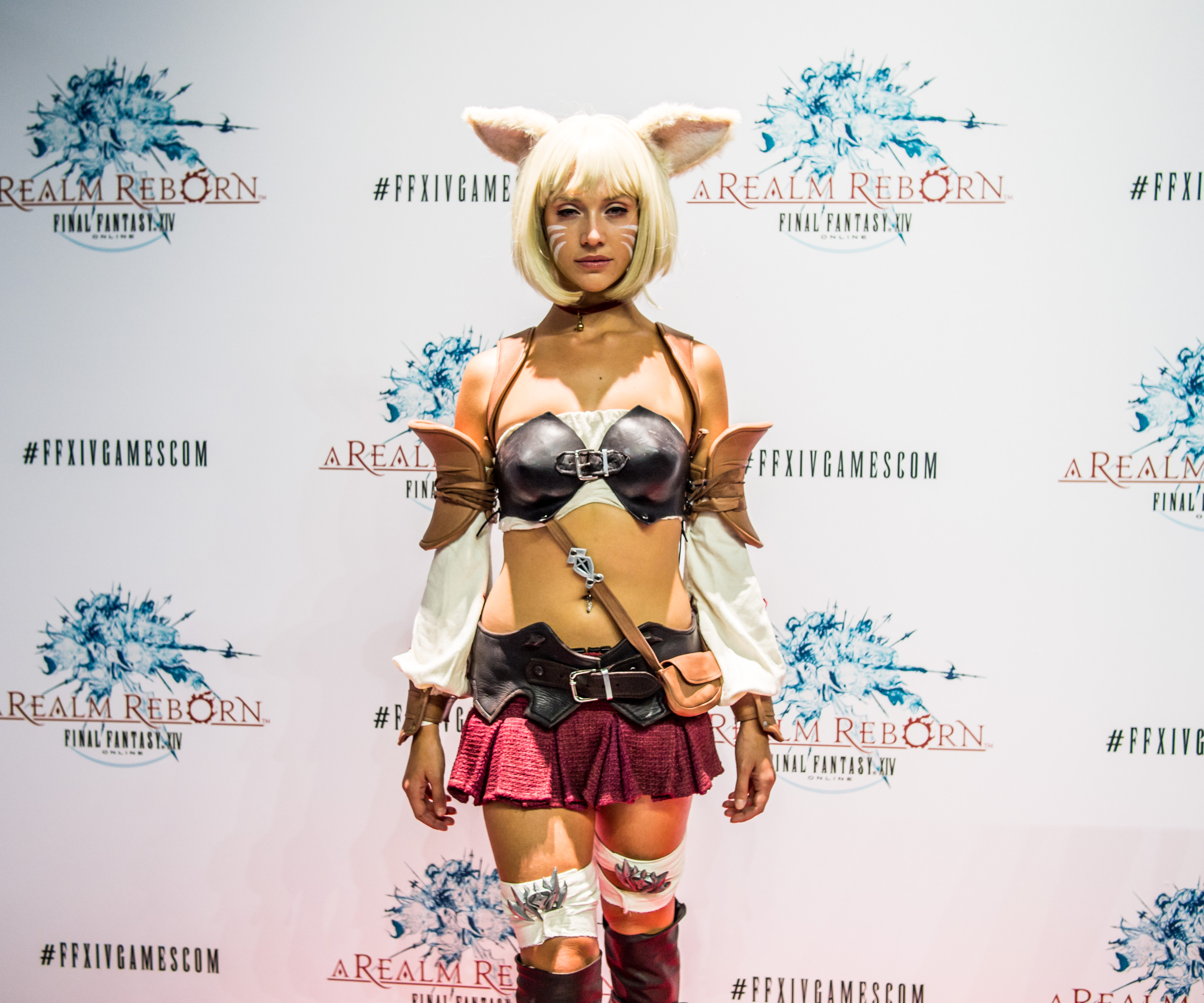 Gamescom expo, Cologne, Germany